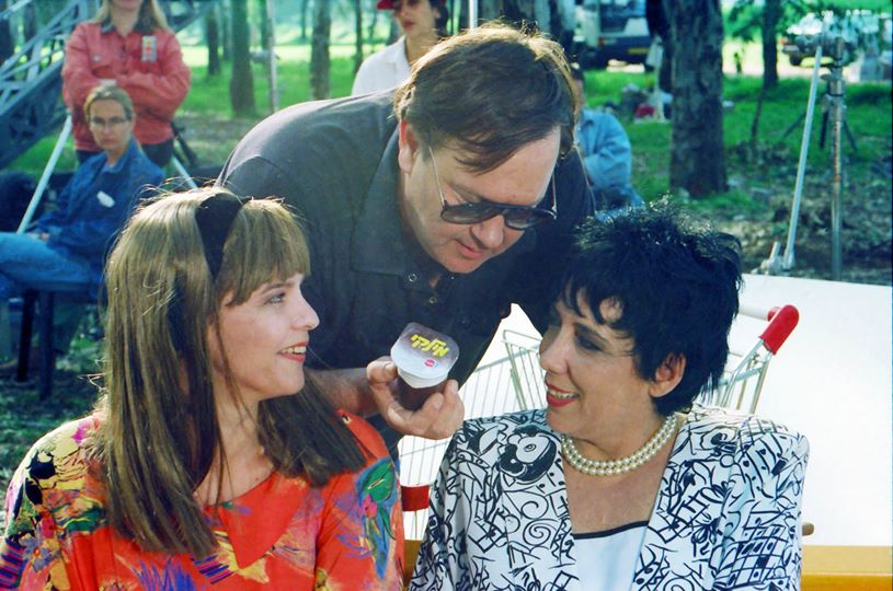 הפקת פרסומת הקרב על המילקי